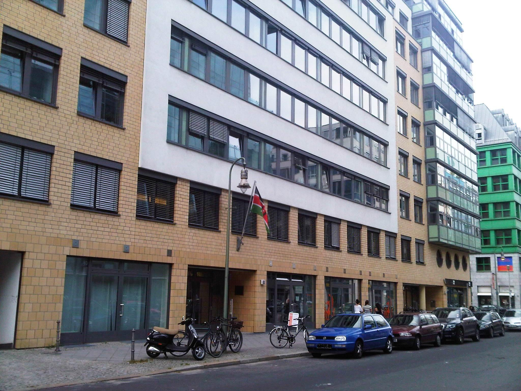 Kenianische Botschaft in Berlin in der Markgrafenstraße in Berlin-Kreuzberg